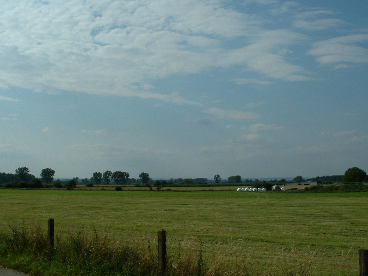 Former Baltringen Bog / Baltringer Ried